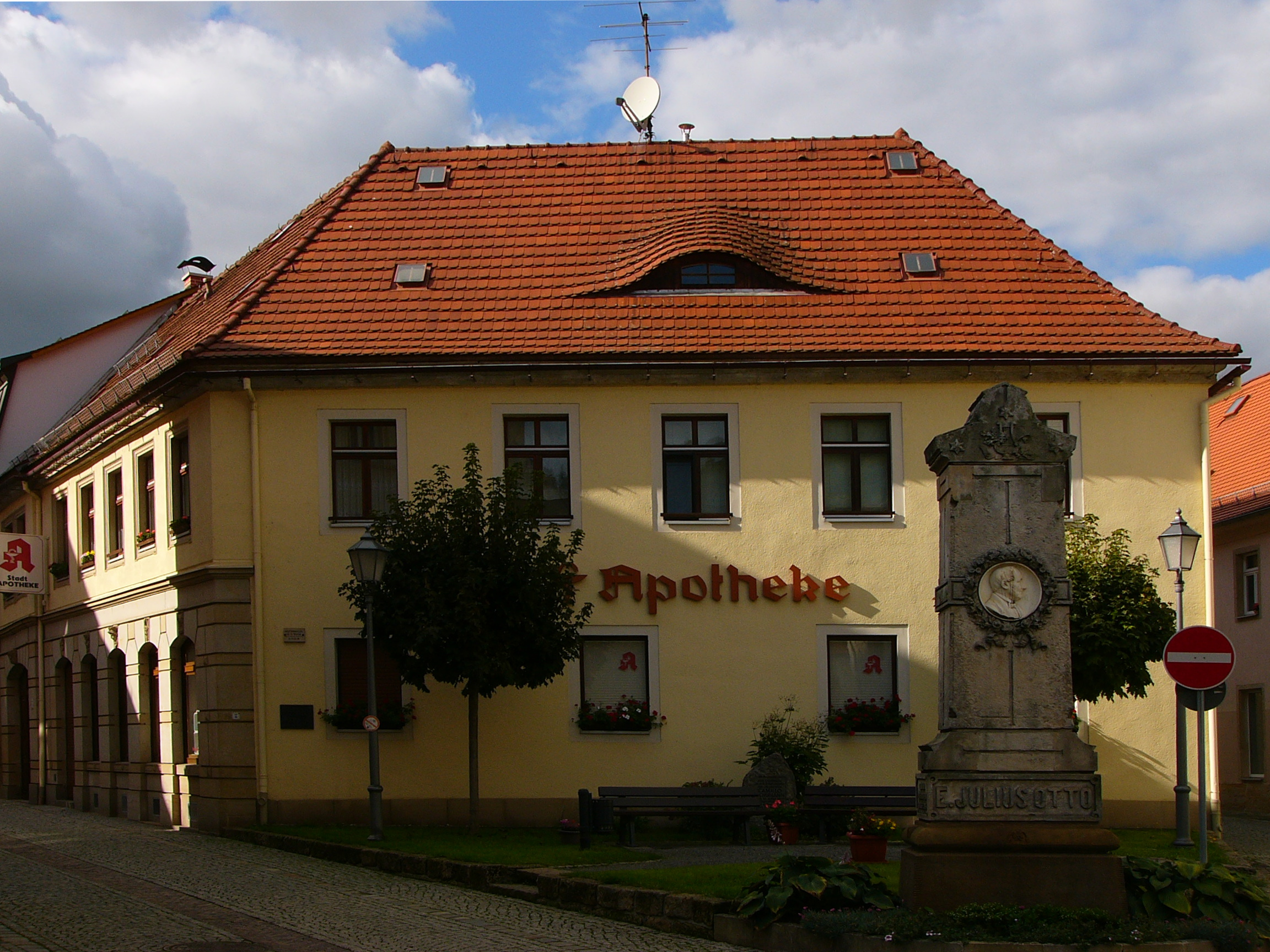 Das Geburtshaus von Ernst Julius und Franz Otto in der Pirnaerstr. 8 in Königstein (Sächsische Schweiz)